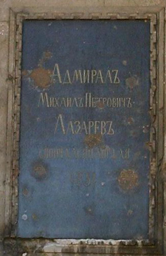 Плита на месте захоронения адмирала Лазарева в соборе святого Владимира в Севастополе Плита на могиле адмирала Лазарева, Владимирский собор в Севастополе (усыпальница русских адмиралов)